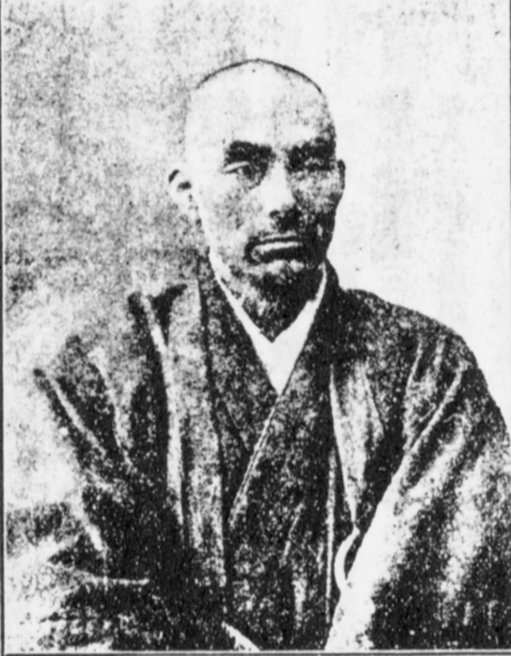 鷲尾順敬・編『増訂日本仏家人名辞書』（東京美術）に載る。明治期日本の僧侶・天田愚庵の肖像。